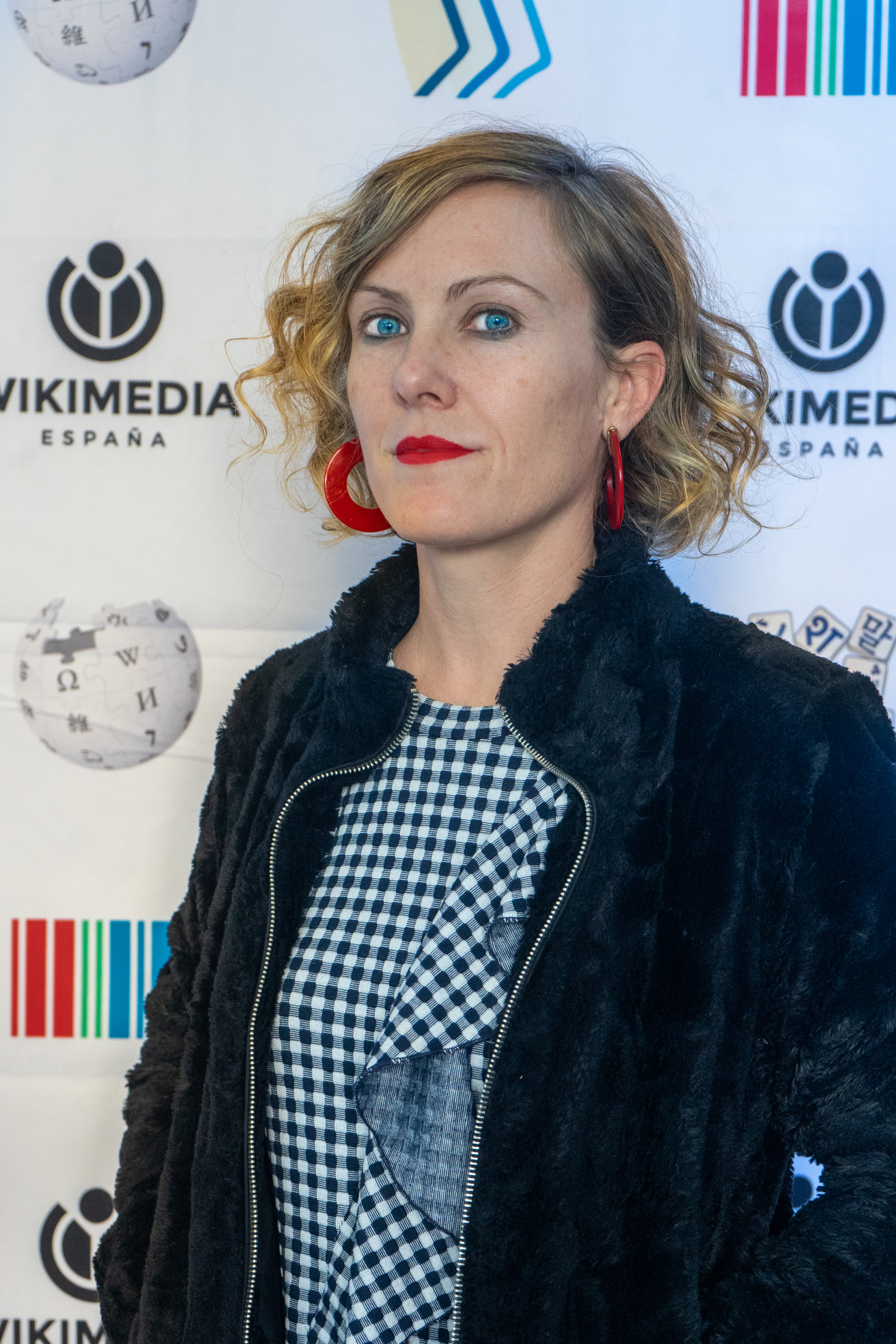 La artista Verónica Ruth Frías en la EditatonaMAM celebrada el 26 de Octubre en La Térmica